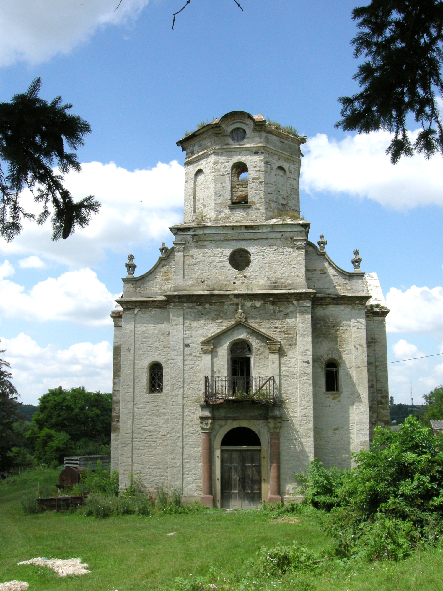 Костел (мурований) у селі Баворів Тернопільського району Тернопільської області.